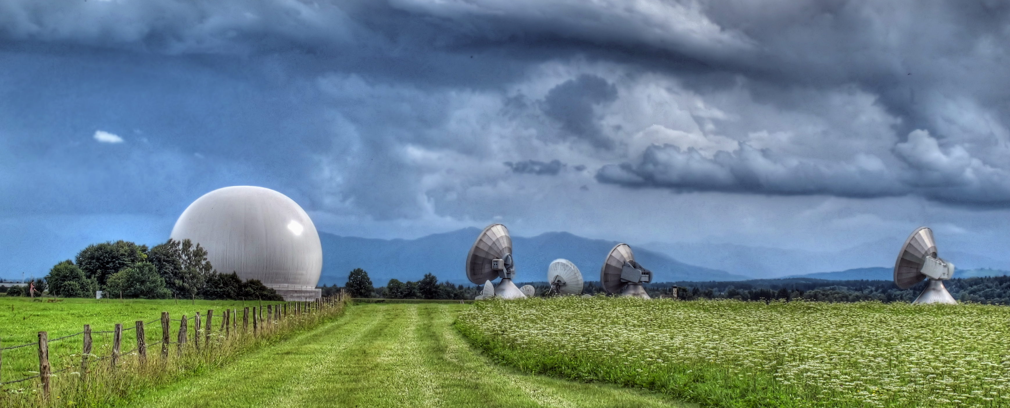 Deutschland, Bayern, Landkreis Weilheim-Schongau, Gemeinde Raisting, Erdfunkstelle, HDR-Image